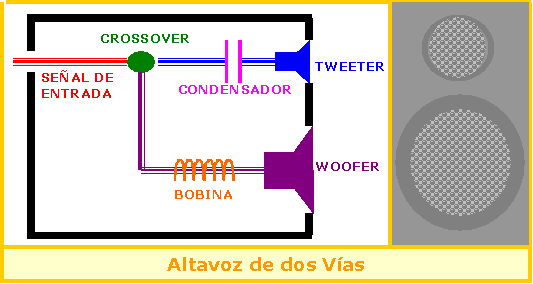 Устройство 2-х полосной акустической системы.